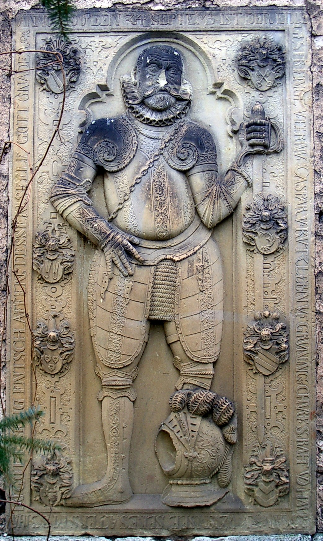 Grabplatte des Caspar v. Kutzleben Grüning in der Kirchenwand von Grüningen